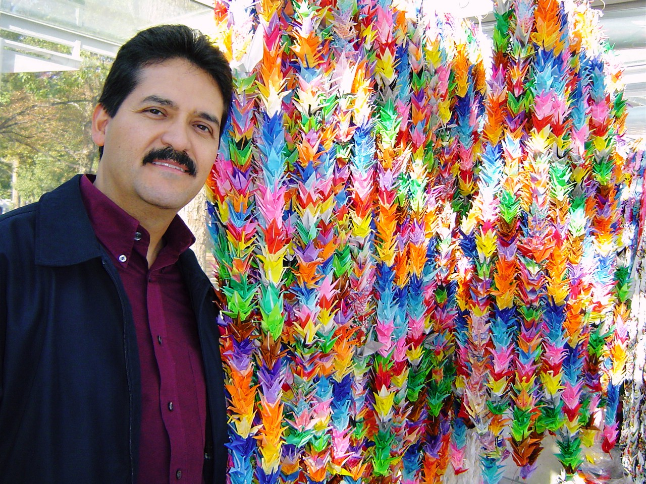 Gregory Zambrano en Hiroshima